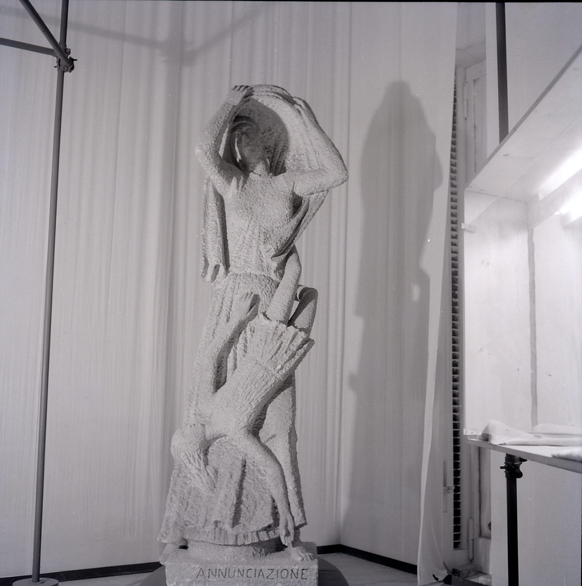 Servizio fotografico : Milano, 1963 / Paolo Monti. - Buste: 15, Fototipi: 15 : Negativo b/n, gelatina bromuro d'argento/ pellicola ; 6x6. - ((Serie costituita da 15 negativi identificati con i nn.: 15898-15912. Sulla busta del negativo R15898 manoscritto: "Arturo Martini". Numerazione parallela: S-6, S-14/S-19, S-29, S-50. La suddetta serie è contenuta nella scatola identificata con la numerazione R15798/R16016. Sul coperchio iscrizione manoscritta a pennarello: "Scultori". - Occasione: Documentazione della scultura bronzea di Arturo Martini presso la Galleria Milione. - Fonte: Rubrica di Paolo Monti: Archivio fino 1-4-1961/ 31-3-1963 (1961-1963), presso Archivio Paolo Monti